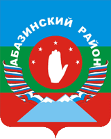 Герб Абазинского муниципального района, Карачаево-Черкесия